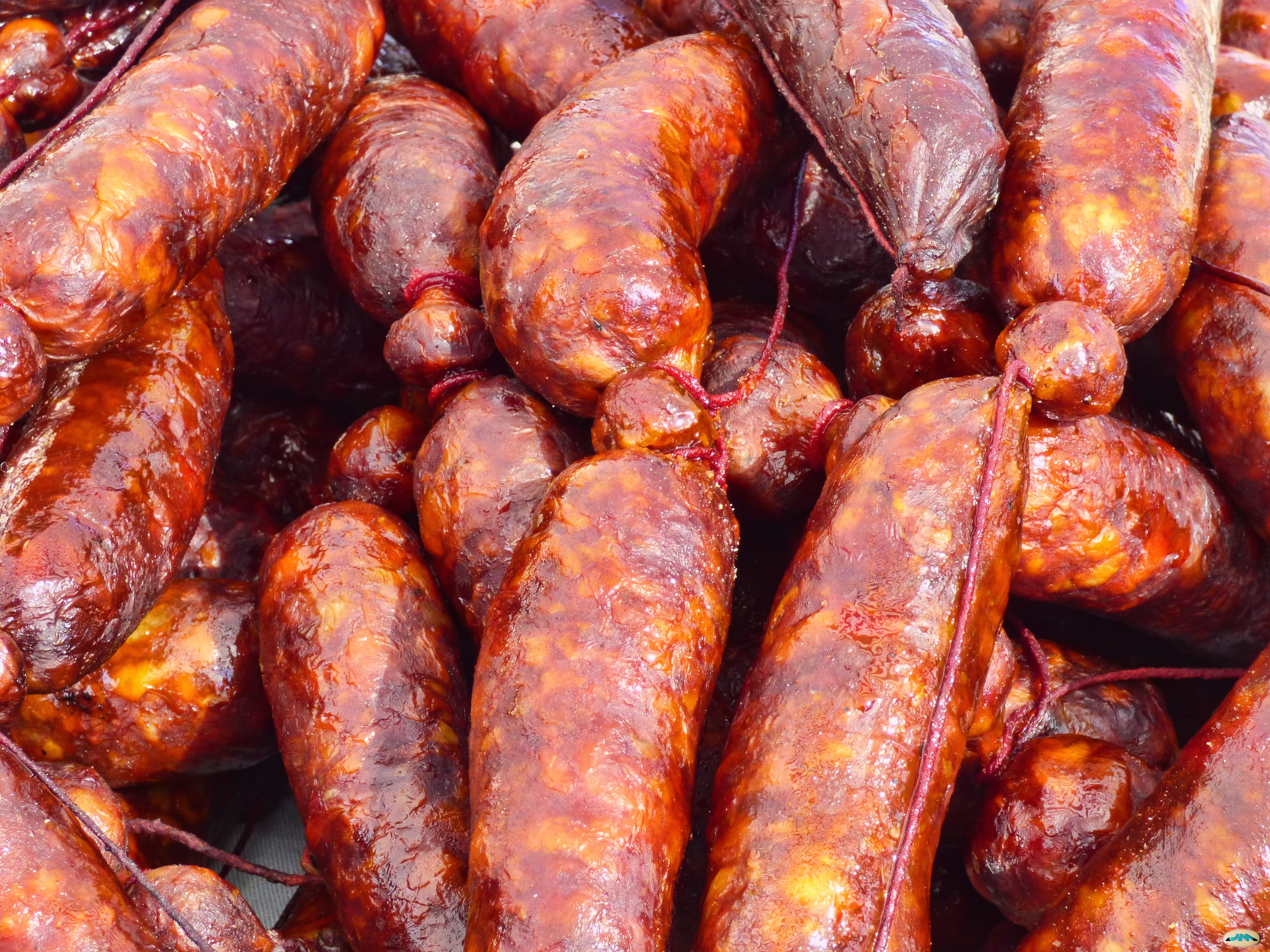 Chourizos de Mosteiro